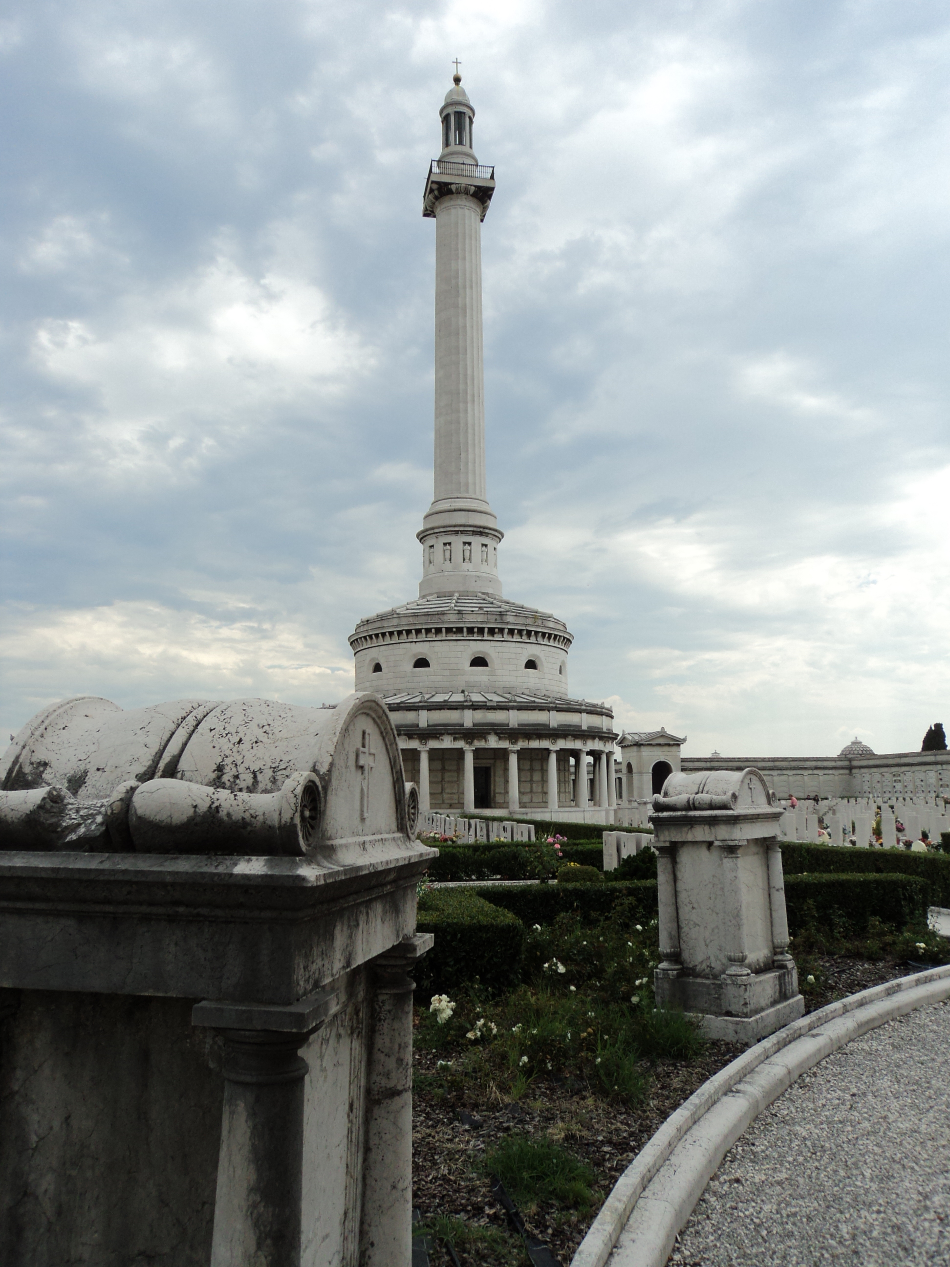 Il Faro di Brescia nel Cimitero Monumentale